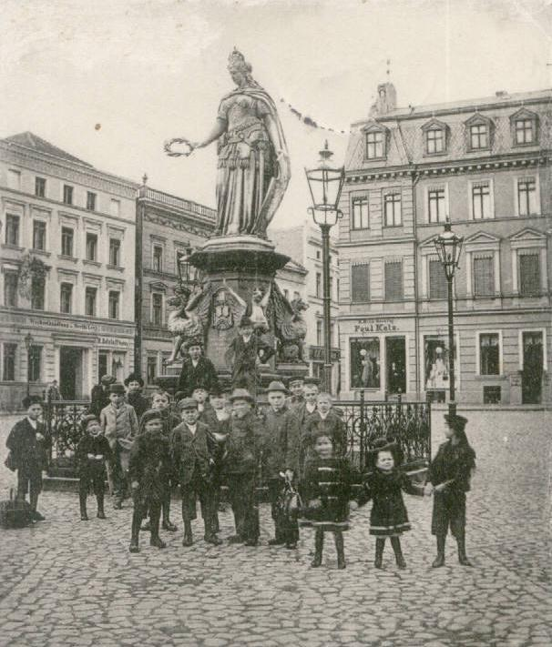 Pomnik Germanii na Rynku Staromiejskim w Stargardzie